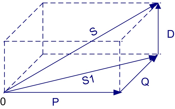 Ziegerdiagramm der Verzerrungsblindleistung bei nicht-sinusförmigen Wechselspannungen